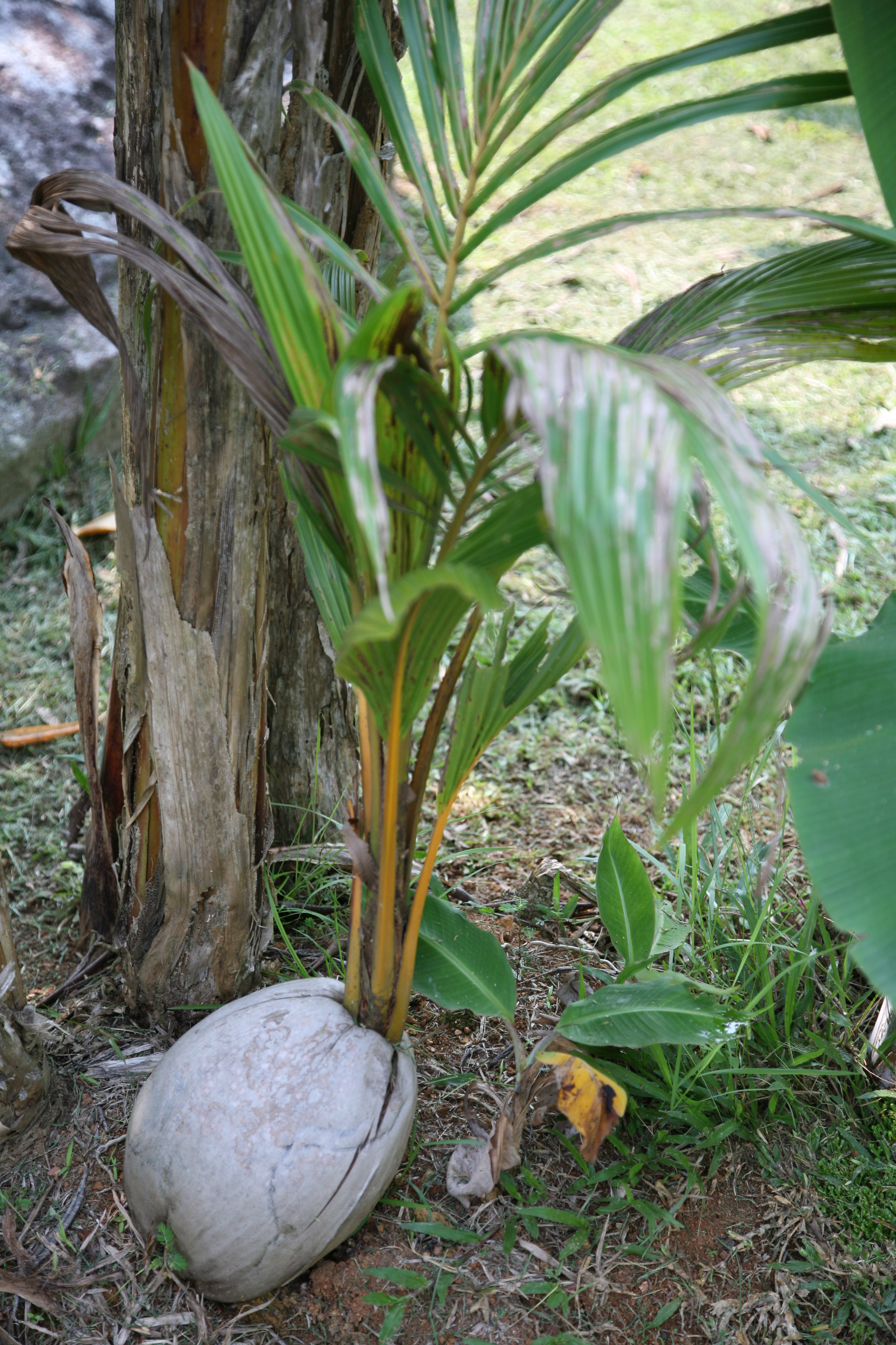 Une des espèces les plus utilisées en cosmétopée